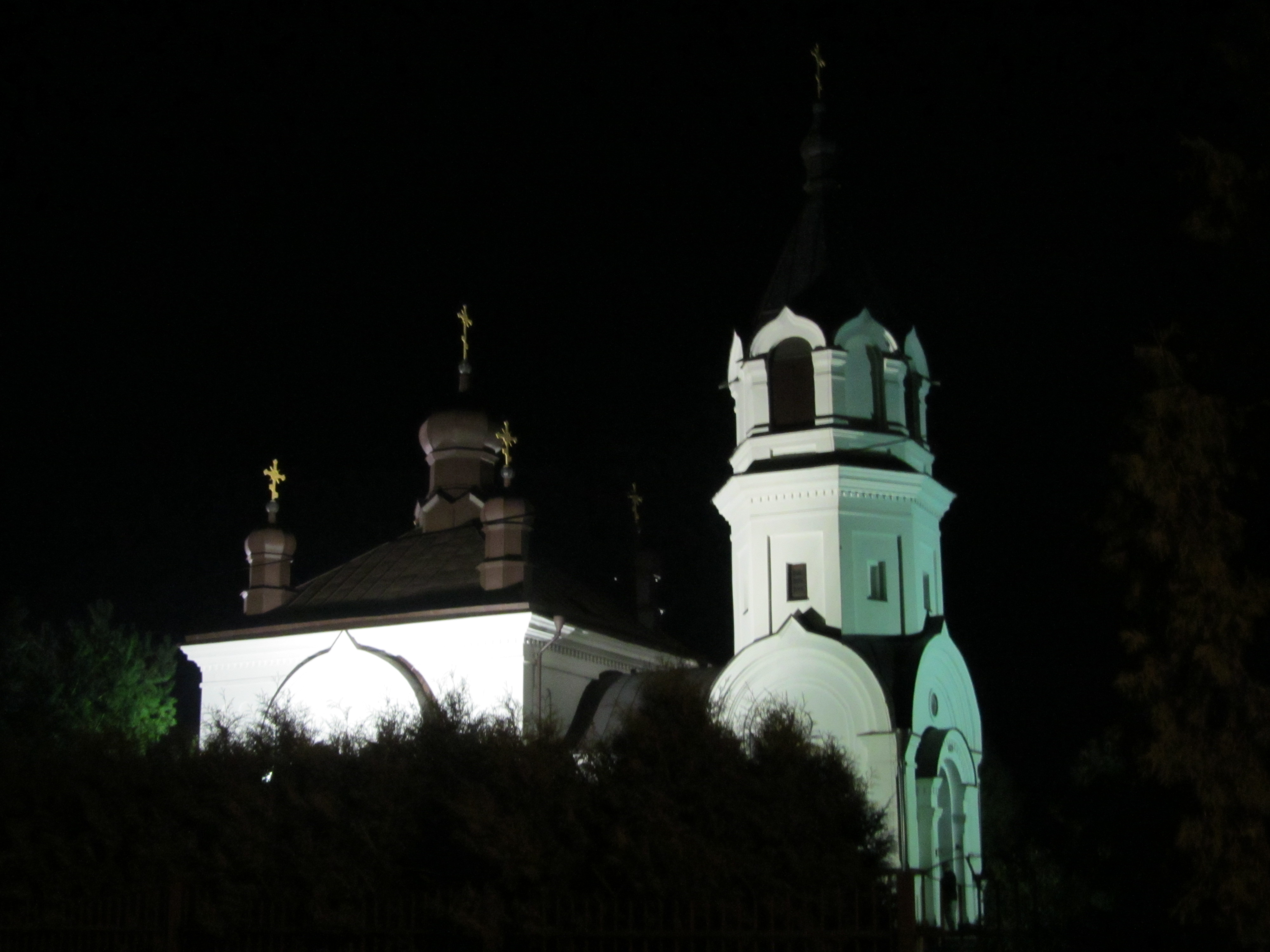 cerkiew prawosławna par. p.w. Matki Boskiej Opiekuńczej - Choroszcz, Choroszcz 11.1987.